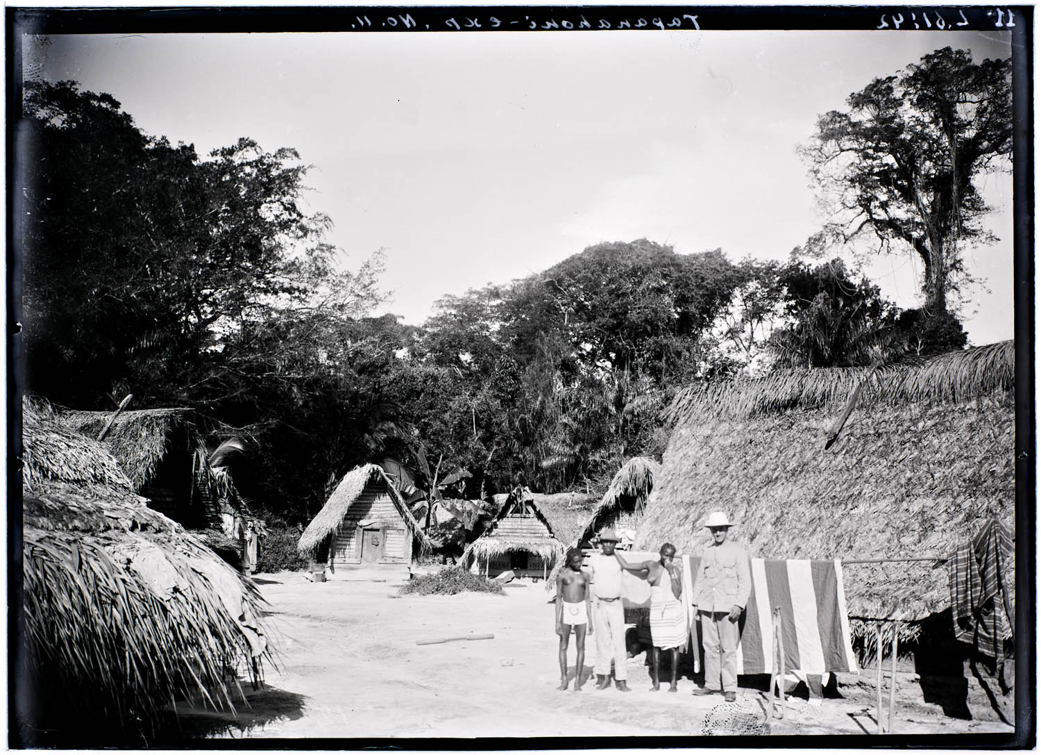 Het dorp Saje in de Tapanahoni met enkele bewoners en C.H. de Goeje en Melchiot